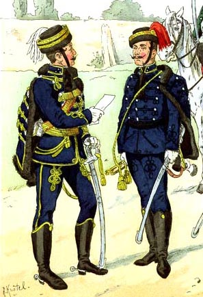 Rittmeister und Trompeter des Jazigier und Kumanier Husaren-Regiments 1859